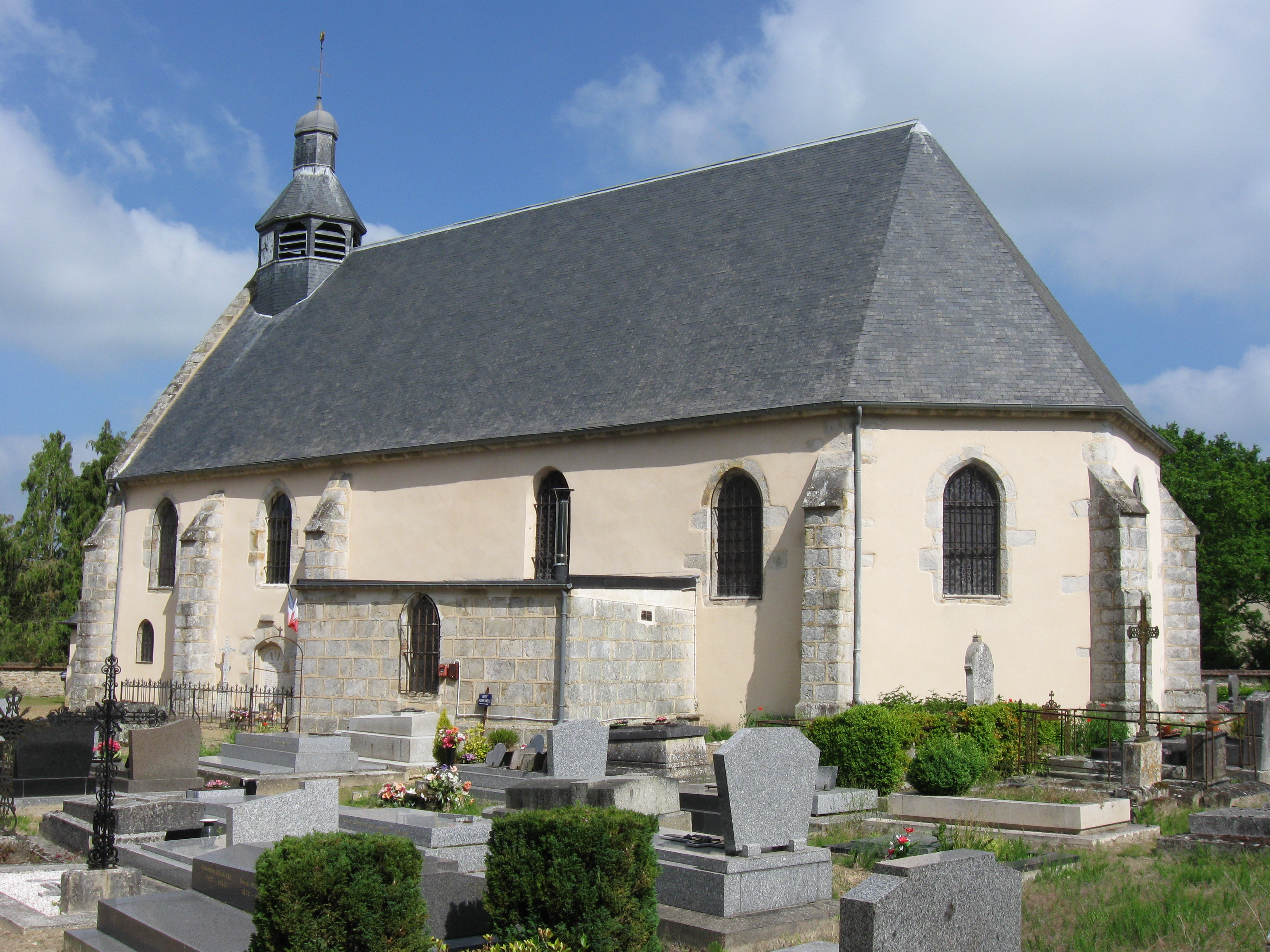 Église Notre-Dame de Raizeux. (Yvelines, région Île-de-France).